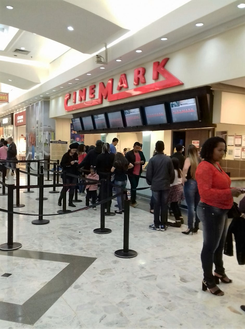 Bilheteria do Cinemark do Shopping Interlagos em São Paulo